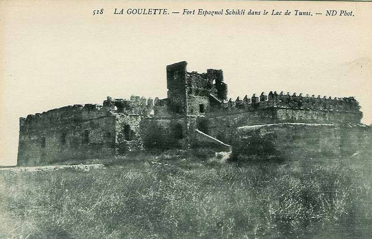 Lac de Tunis Fort de l'ile Schikli